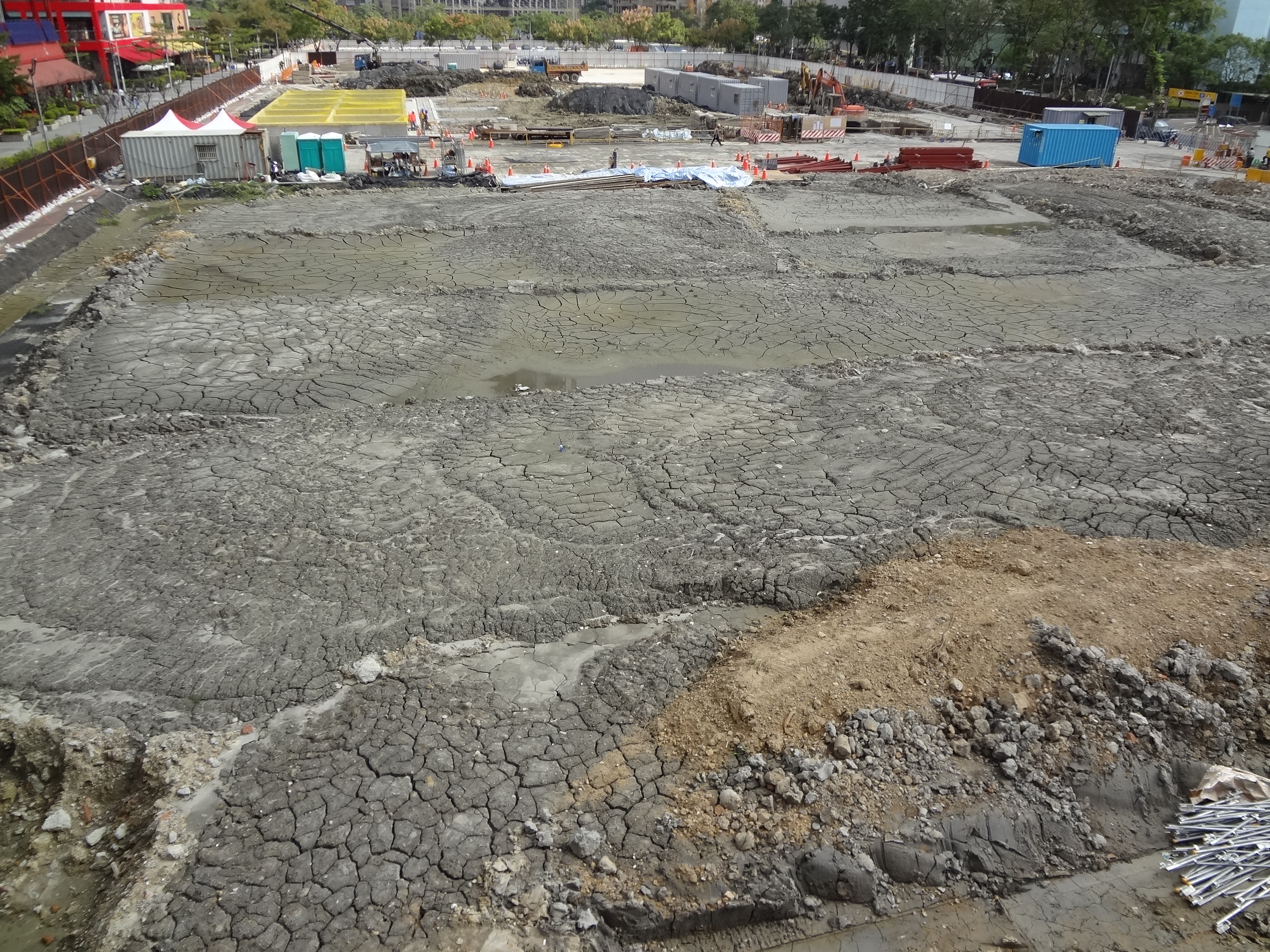 中文（台灣）: 南山廣場工地，原台北世界貿易中心展覽二館土地。